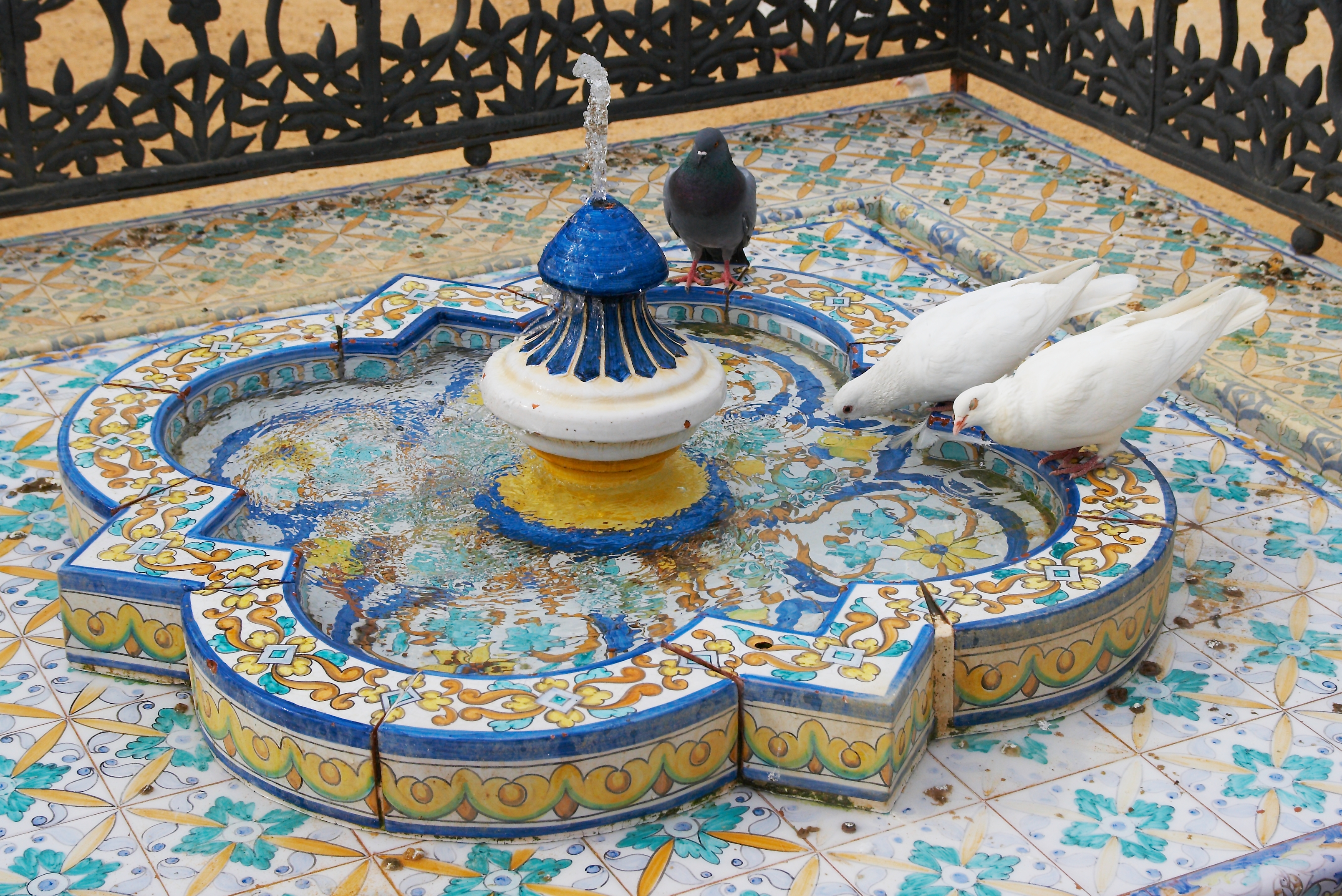 Palomas en el Parque de María Luisa, Sevilla, España.